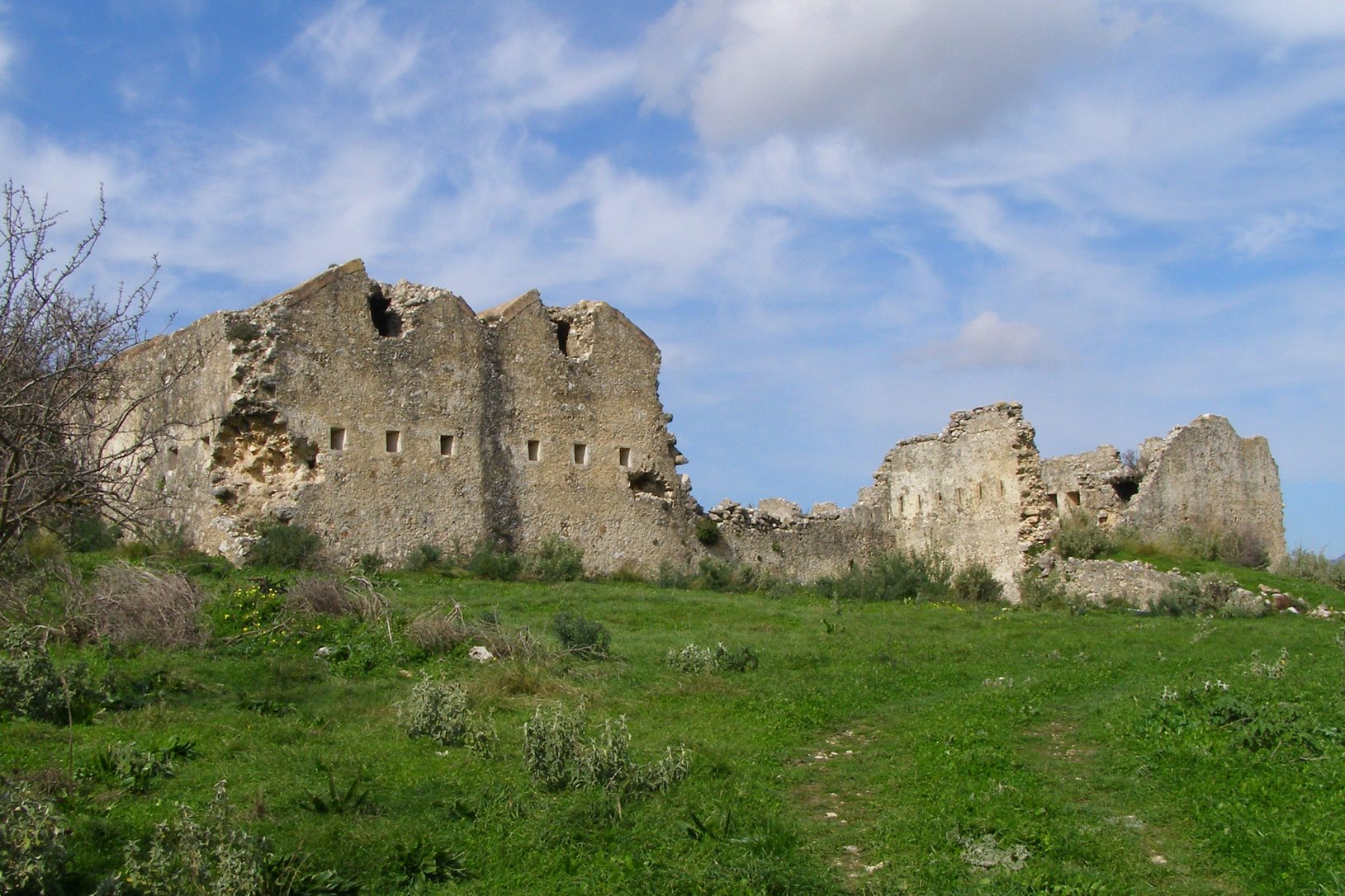 Osmanisches Kastell bei Koxare /Kreta